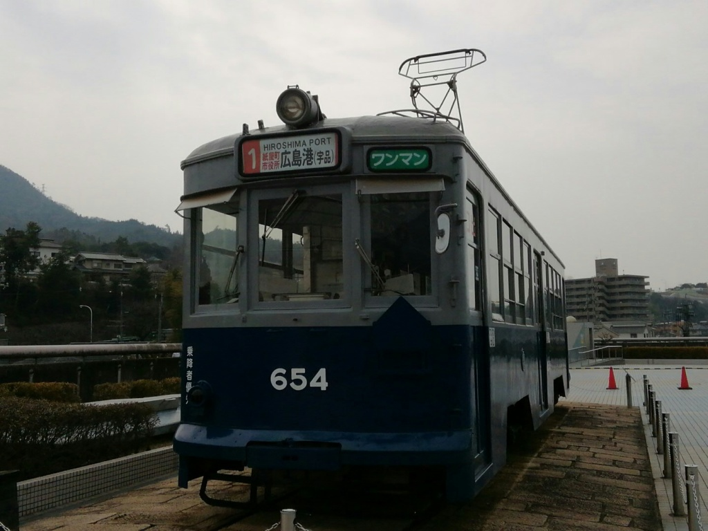 ヌマジ交通ミュージアム（広島市交通科学館）に保存されている、元・広島電鉄650形654号車です。